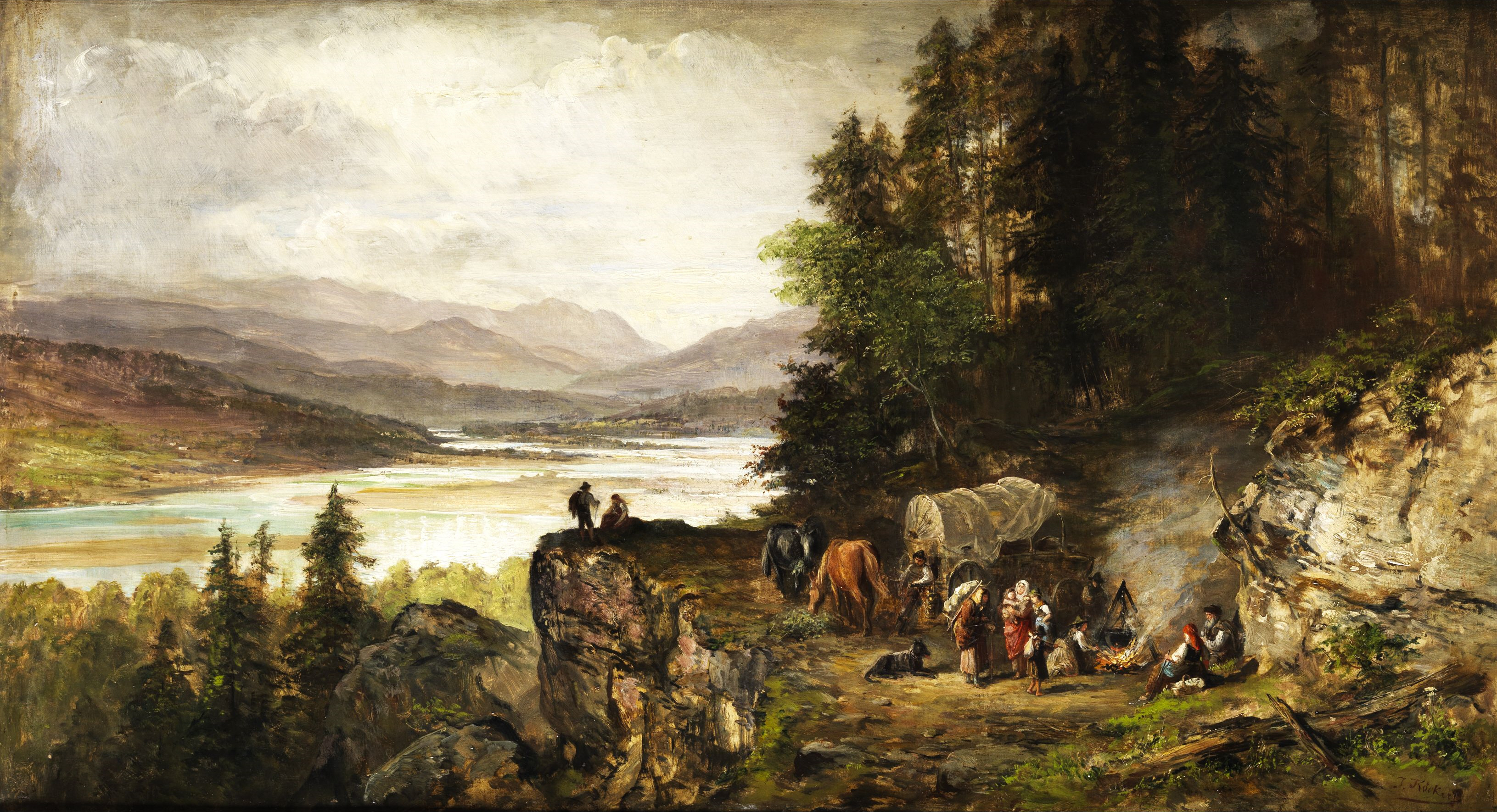 Die Rast im Hochgebirge. Öl auf Leinwand. 55,5 x 101 cm